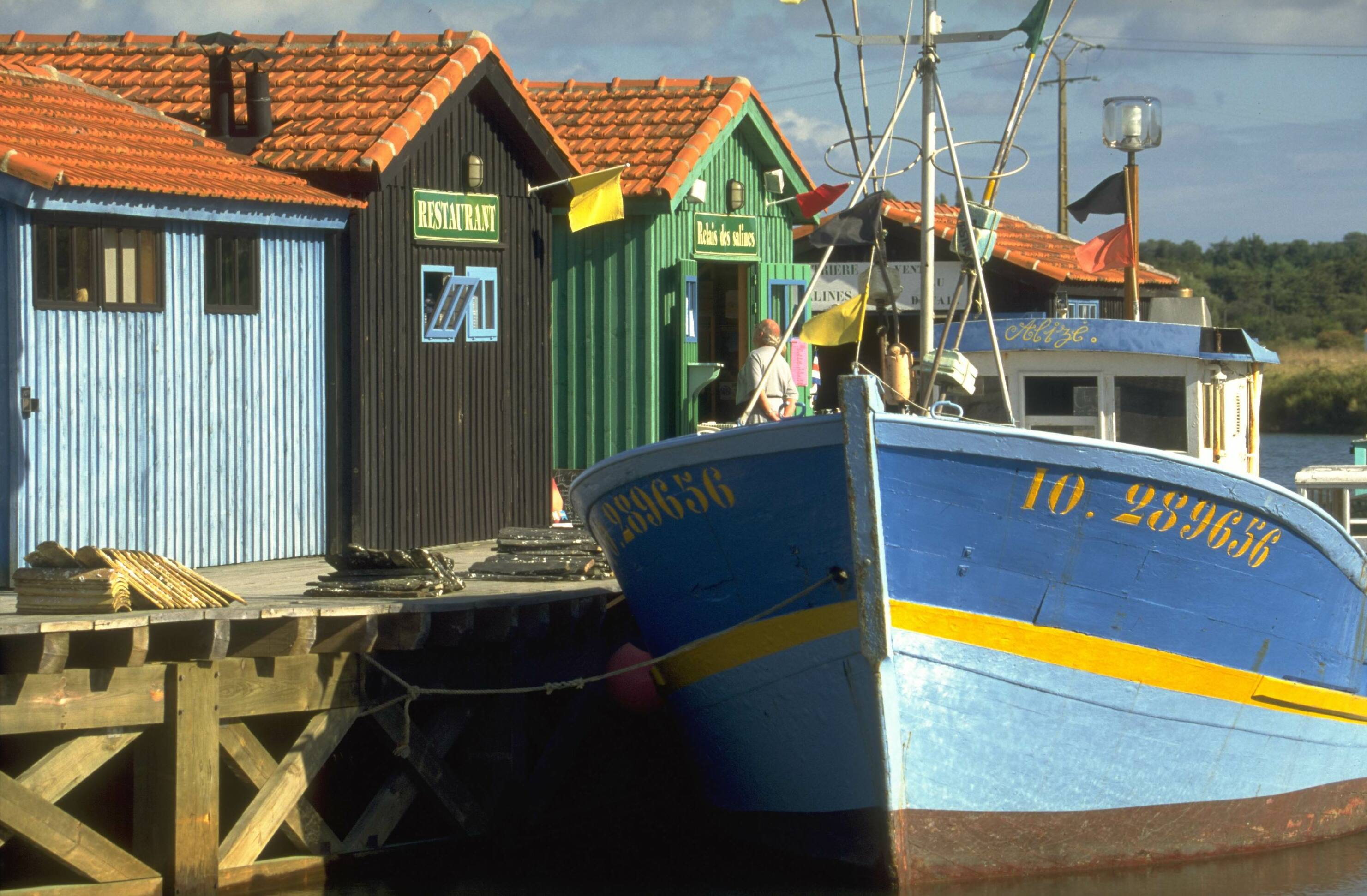 Port des Salines, Le-Grand-Village-Plage, Île d'Oléron (Charente maritime). Crédit photo : Sylvain ROUSSILLON